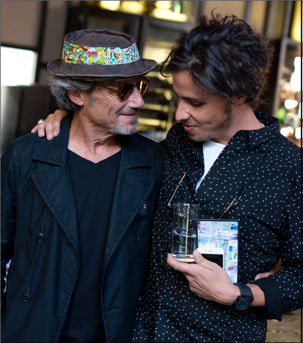 Jean-Dominique et Luca Orsa